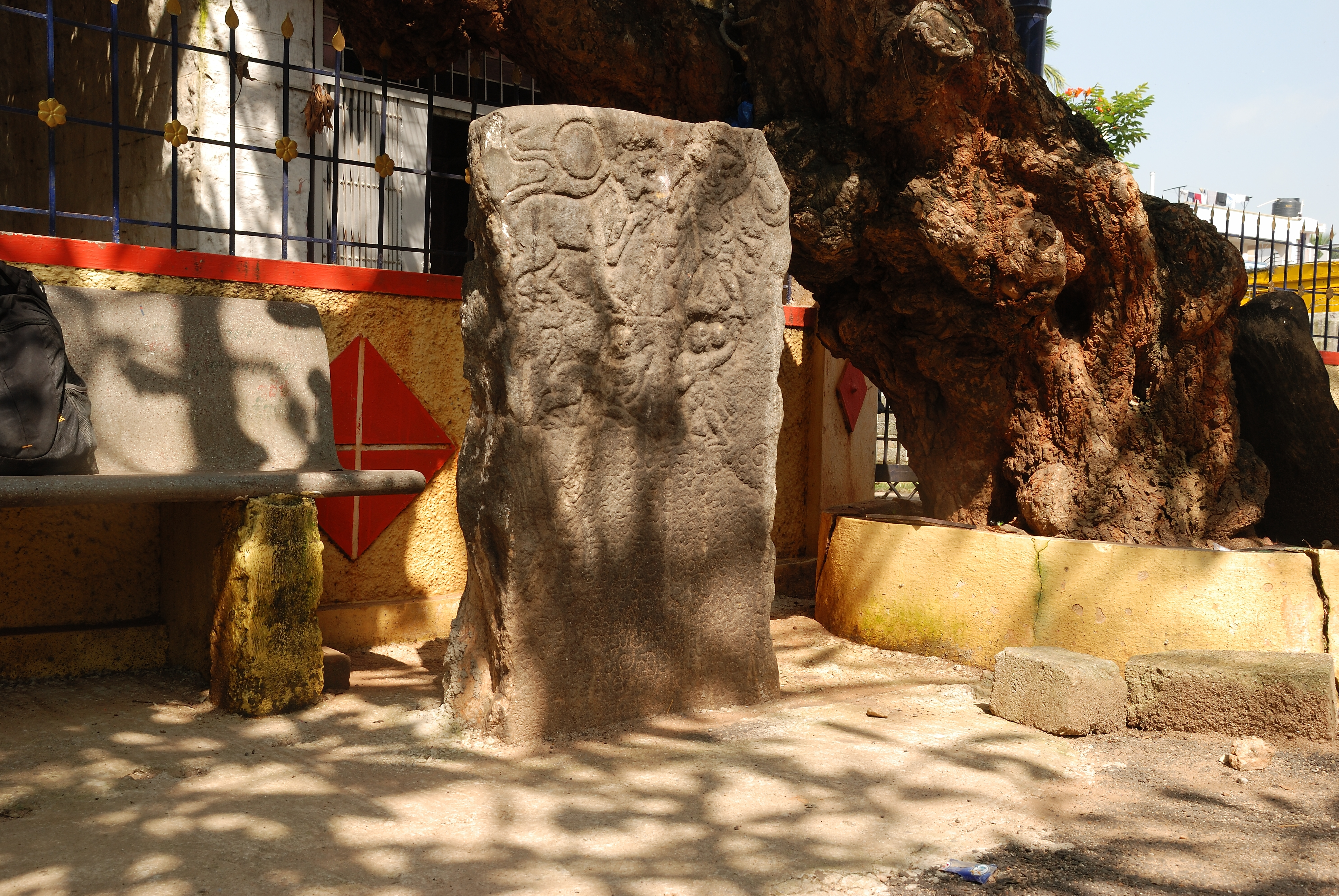 ಕನ್ನಡ: Byadarahalli